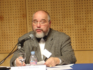 Franck Bouscau